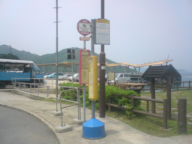 中文（香港）: 黃石碼頭巴士總站(2010.8):96R,698R